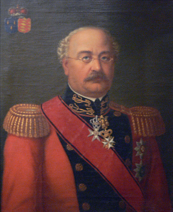 Friedrich Fürst von Waldburg-Wolfegg-Waldsee (1808–1871), mit Allianzwappen Waldburg (Tanne) – Königsegg, Öl auf Leinwang, 74 x 61 cm, Kunstsammlungen Waldburg-Wolfegg